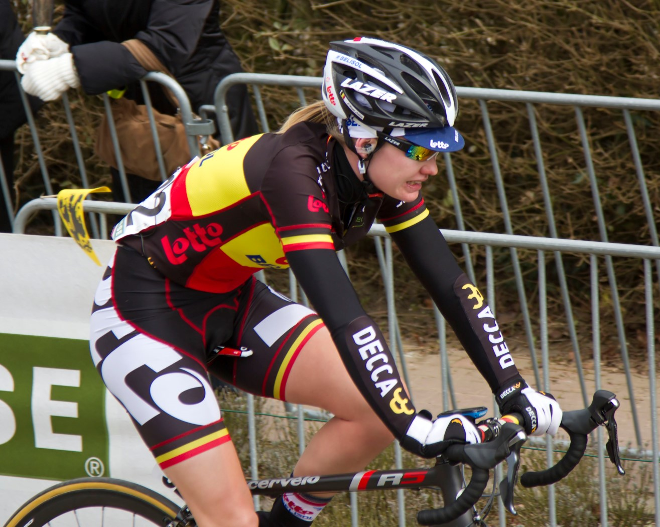 180 jolien dhoore